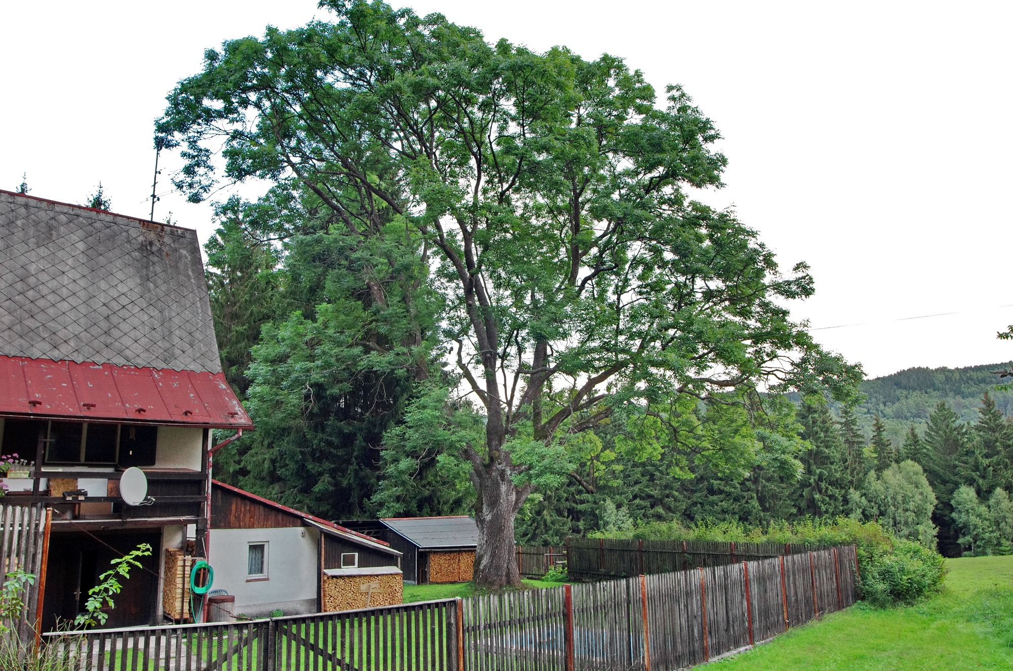 Památný strom Winklerův jasan, Krušné hory, okres Karlovy Vary